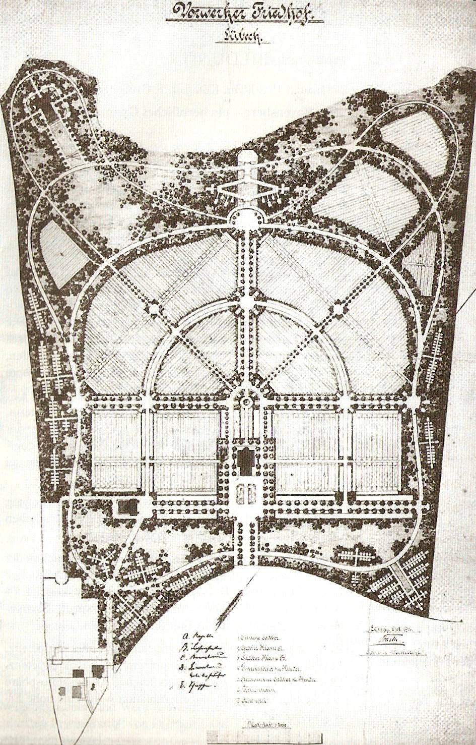 Vorwerker Friedhof, Entwurf Erwin Barth, Oktober 1906. Anmerkungen:abgedruckt in Lübeckische Blätter; 16. Januar 2010*175. Jahrgang*Heft 1